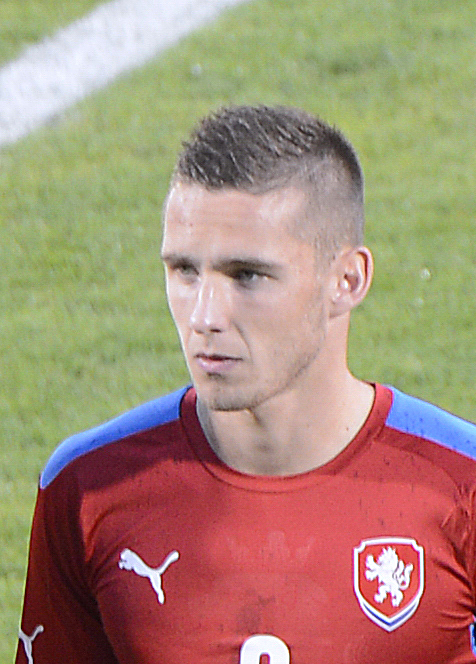 Mezinárodní fotbalový zápas Česko - Rakousko v Olomouce, Pavel Kadeřábek